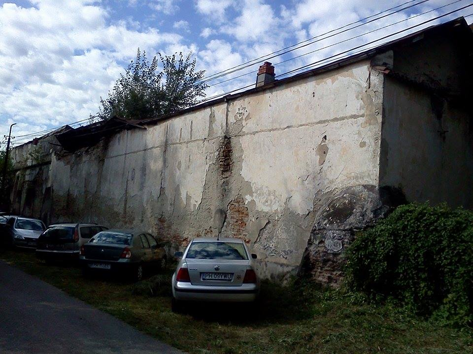 Zidurile celor două incinte 03